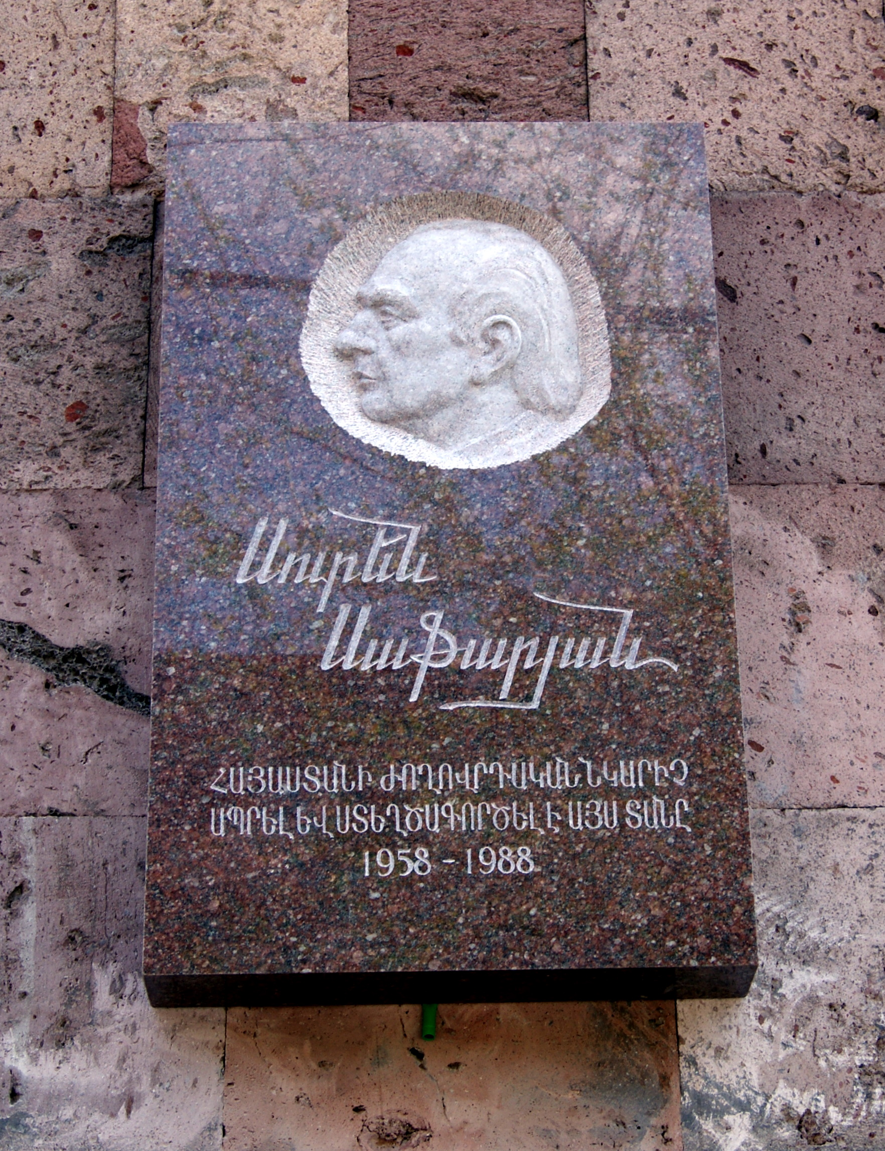 Suren Safaryan's plaque on Kievyan street of Yerevan